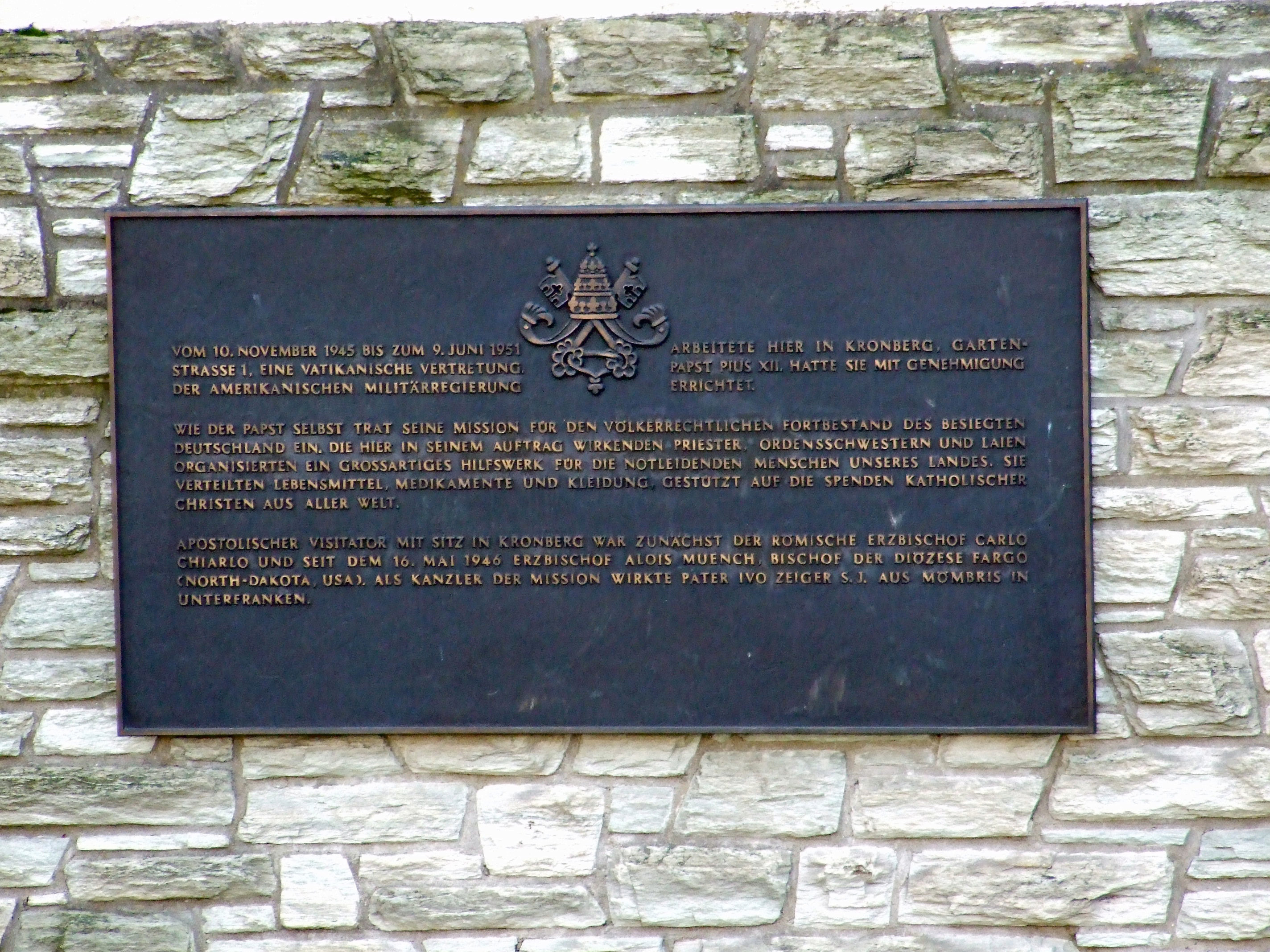 Gedenktafel zur Vatikanischen Vertretung, „St. Peter und Paul“, Kronberger Altstadt